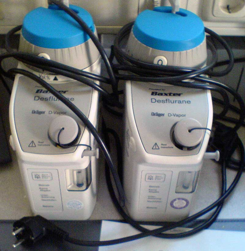 Zwei Narkosemittelverdampfer für Inhalationsanästhetika